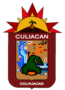 File:JesusVizcarra.PNG